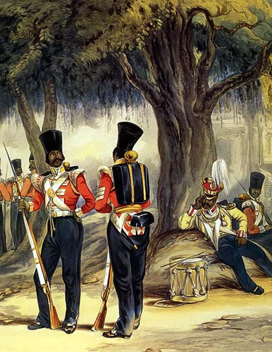 Soldati sepoys della Bengal Native Infantry nella prima metà del XIX Secolo